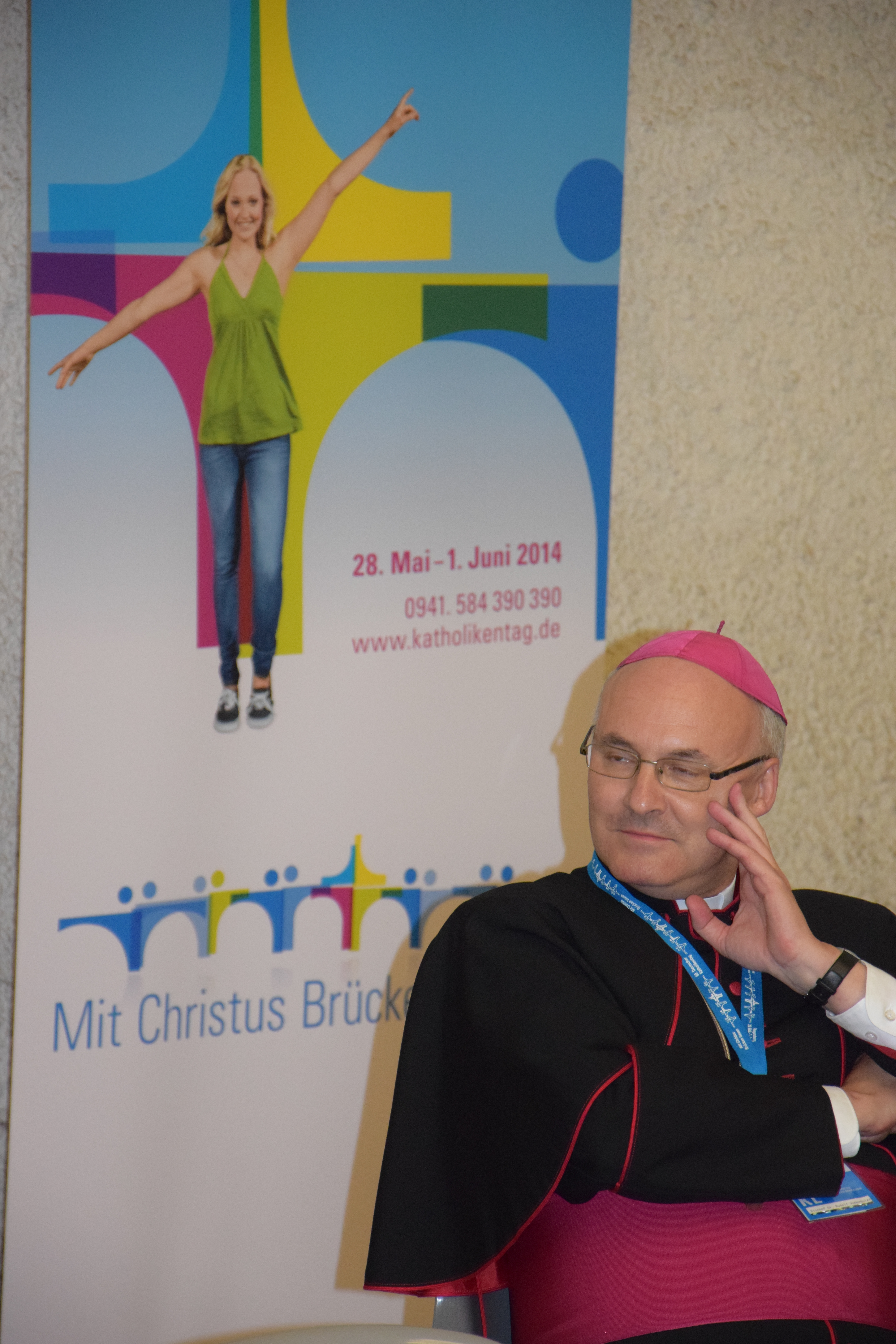 Rudolf Voderholzer, 99. Deutscher Katholikentag in Regensburg